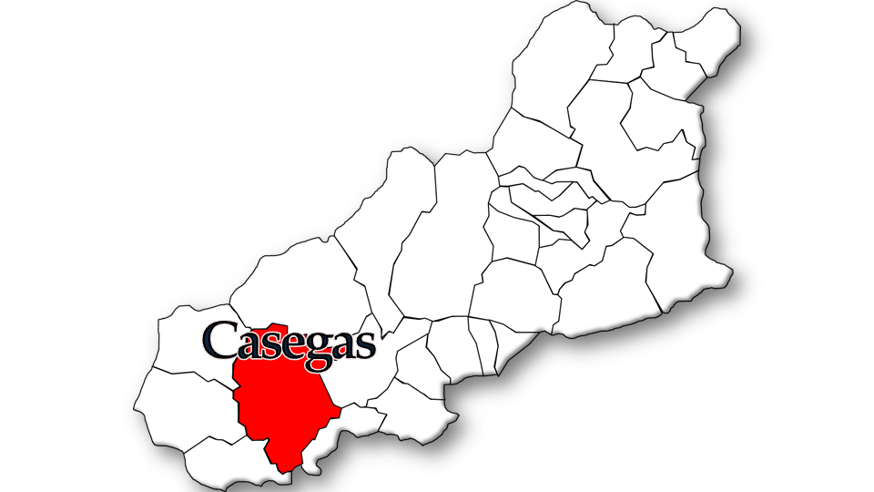 População